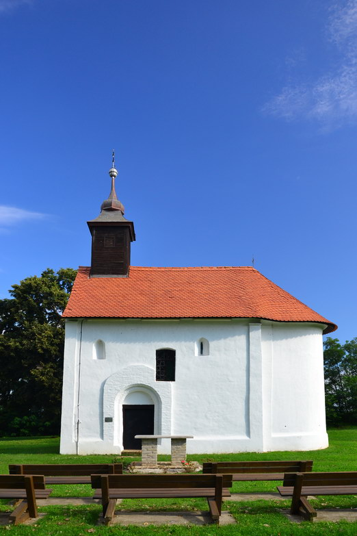 Buzsák - fehér kápolna